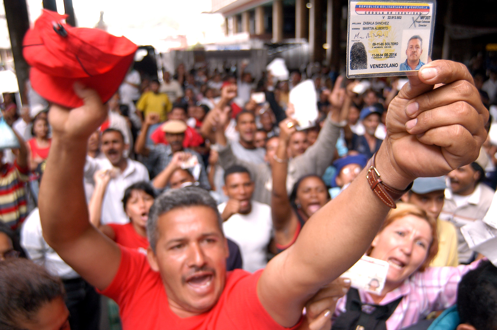 Un venezolano exige su derecho al voto en las afueras del CNE. La oposicion logro llevar al presidente Chavez a un referendo revocatorio presidencial ganado este por amplio margen. Lugar: CNE, Caracas, Venezuela.